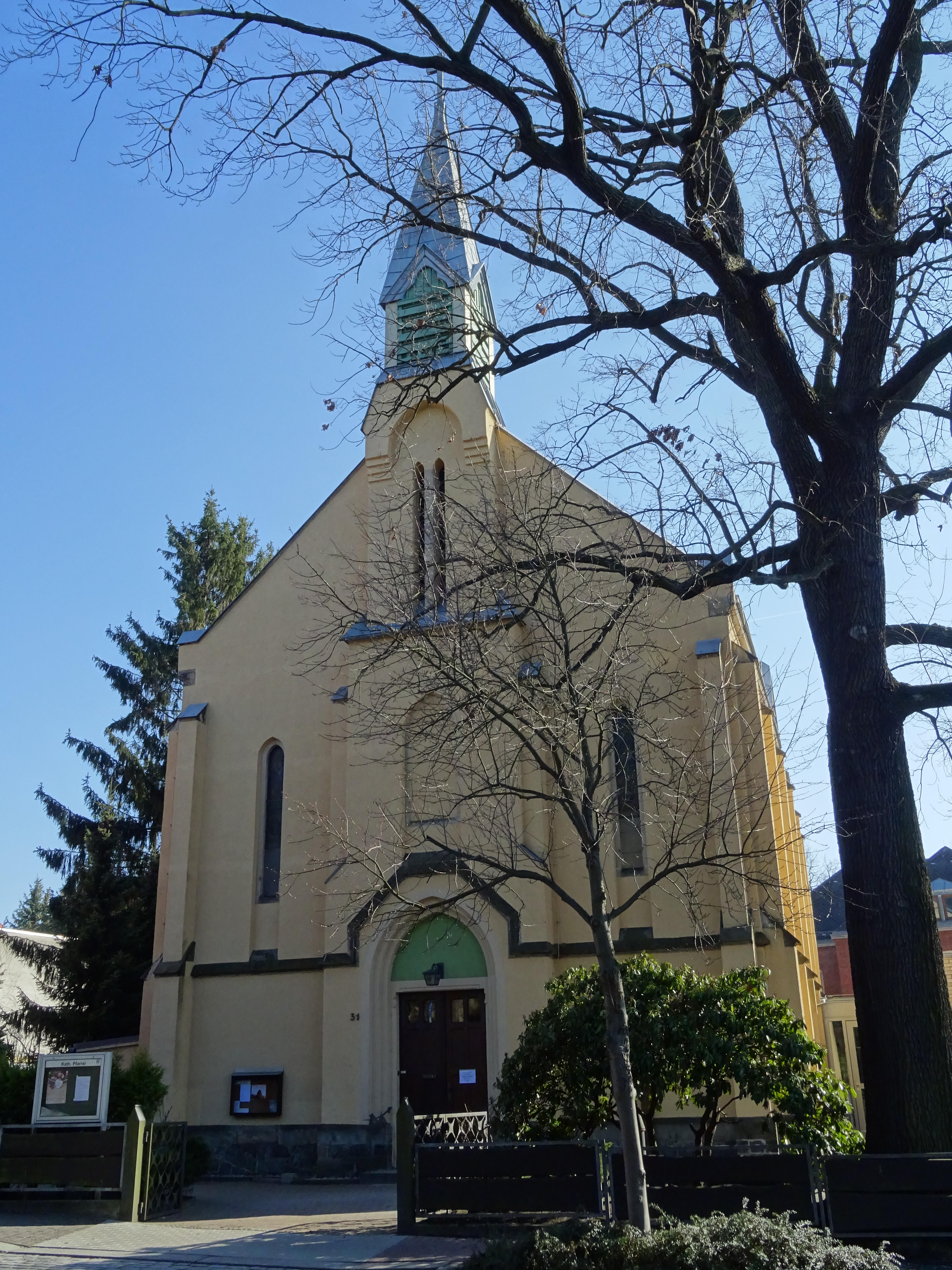 Katholische Kirche in Radeberg, erbaut von 1882 bis 1883 in neogotischen Stil. Derzeit finden Renovierungsarbeiten statt (21.03.2019)